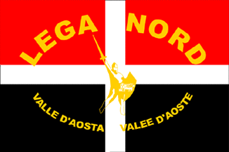 Lliga Nord de la Vall d'Aosta